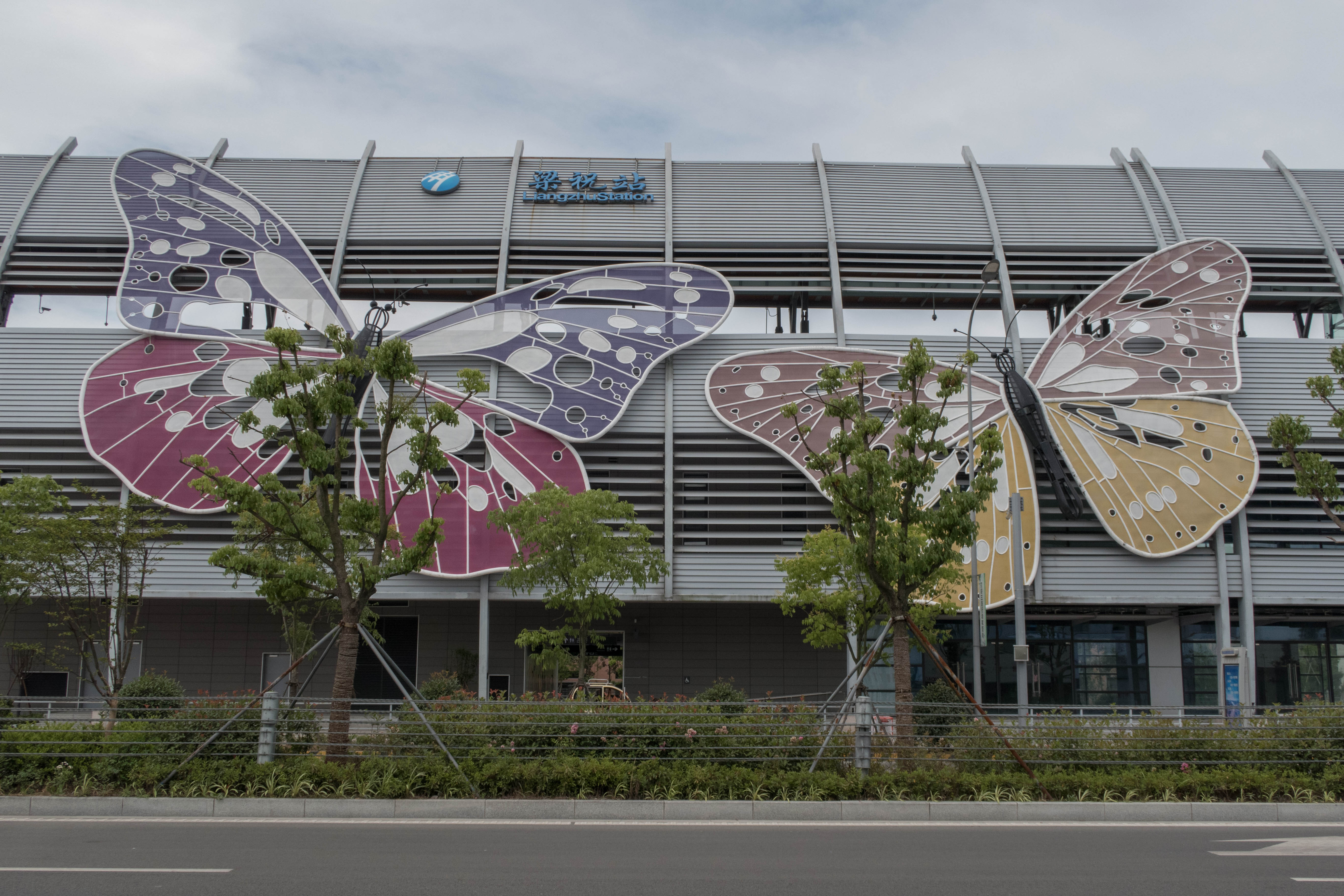 宁波地铁梁祝站